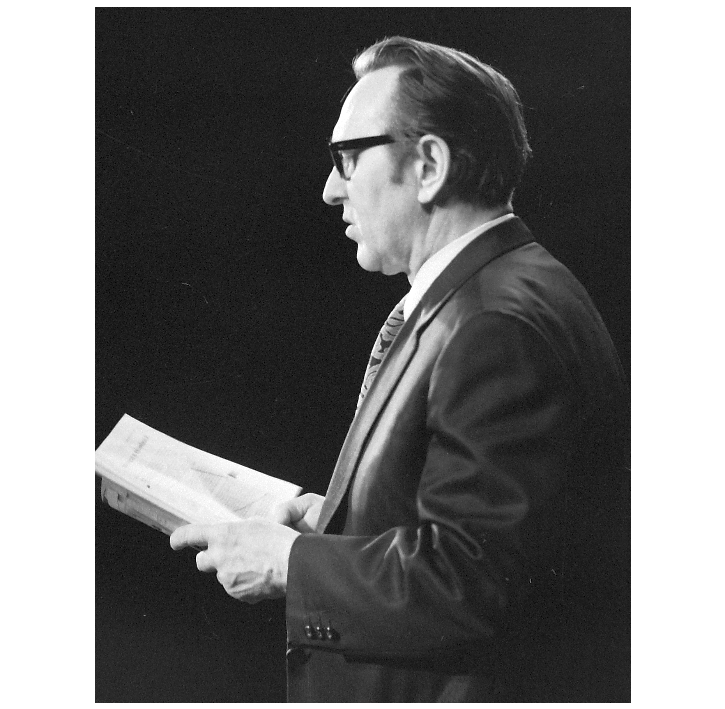 Budapest V., Egyatemi Színpad, Bessenyei Ferenc színművész.